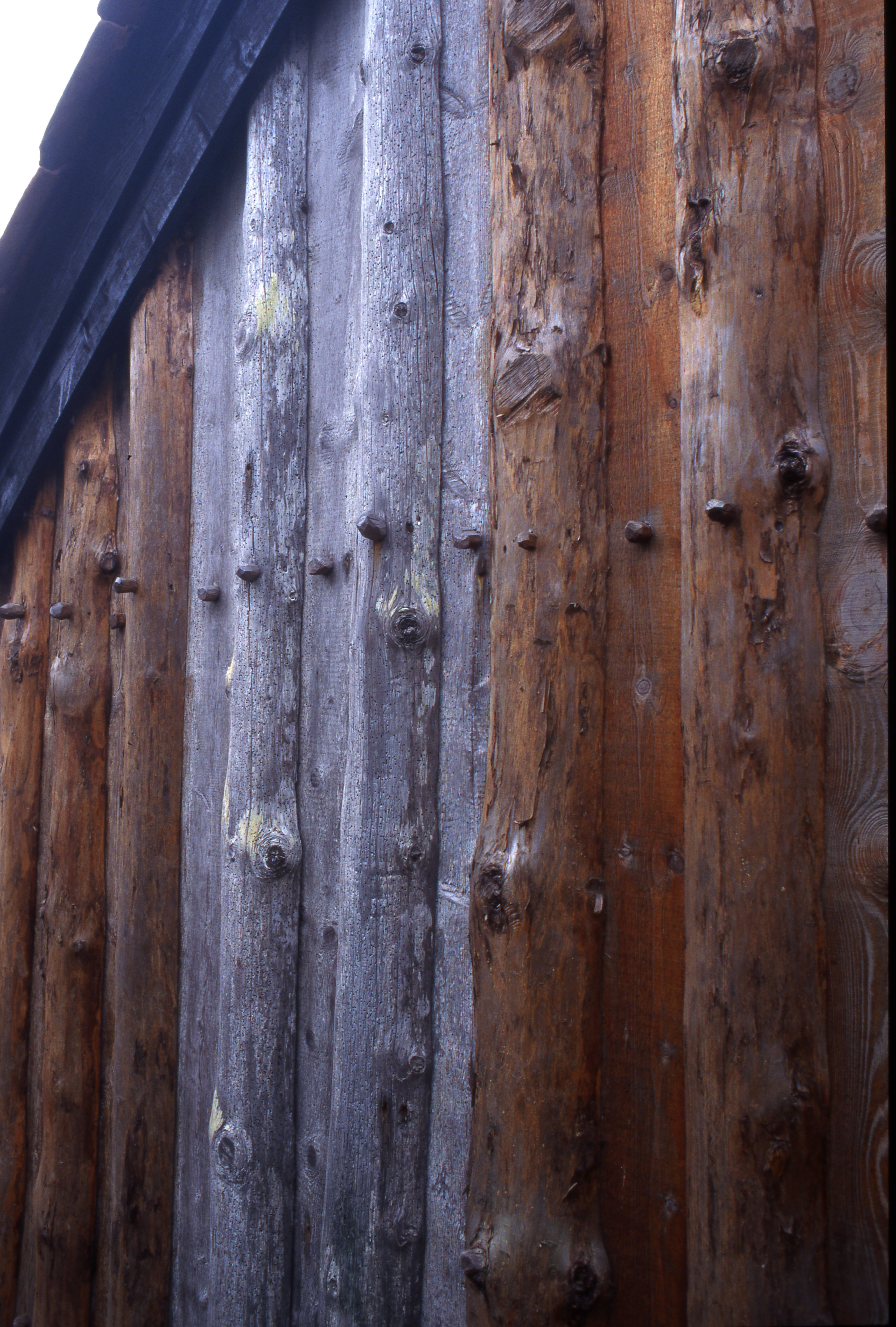 Sjøhus på Krossøy. Kledning av Masfjordbord